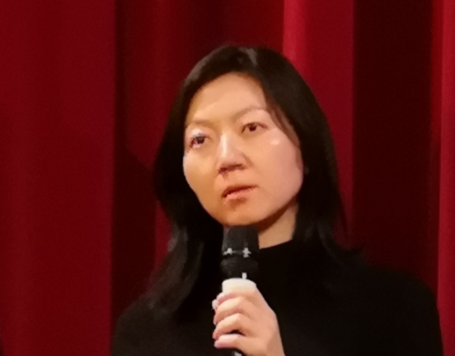 The director at the world premiere of "Ping jing" at Berlinale 2020 in Delphi Filmpalast